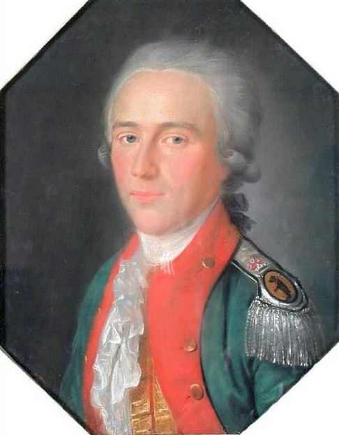 Александр Александрович Делицын (де Лицын) (1768—1789)